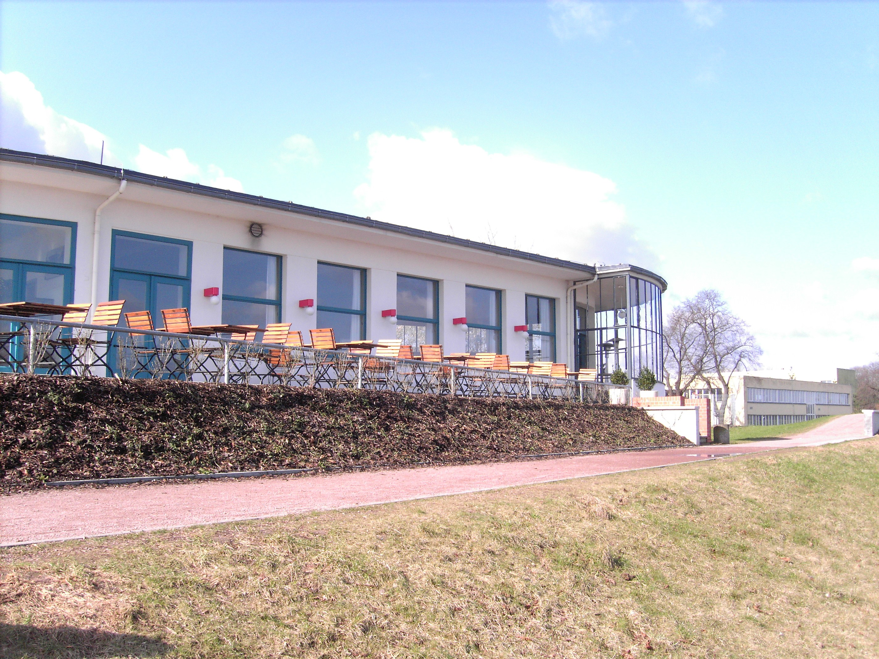 Kornhaus Dessau, Terrasse